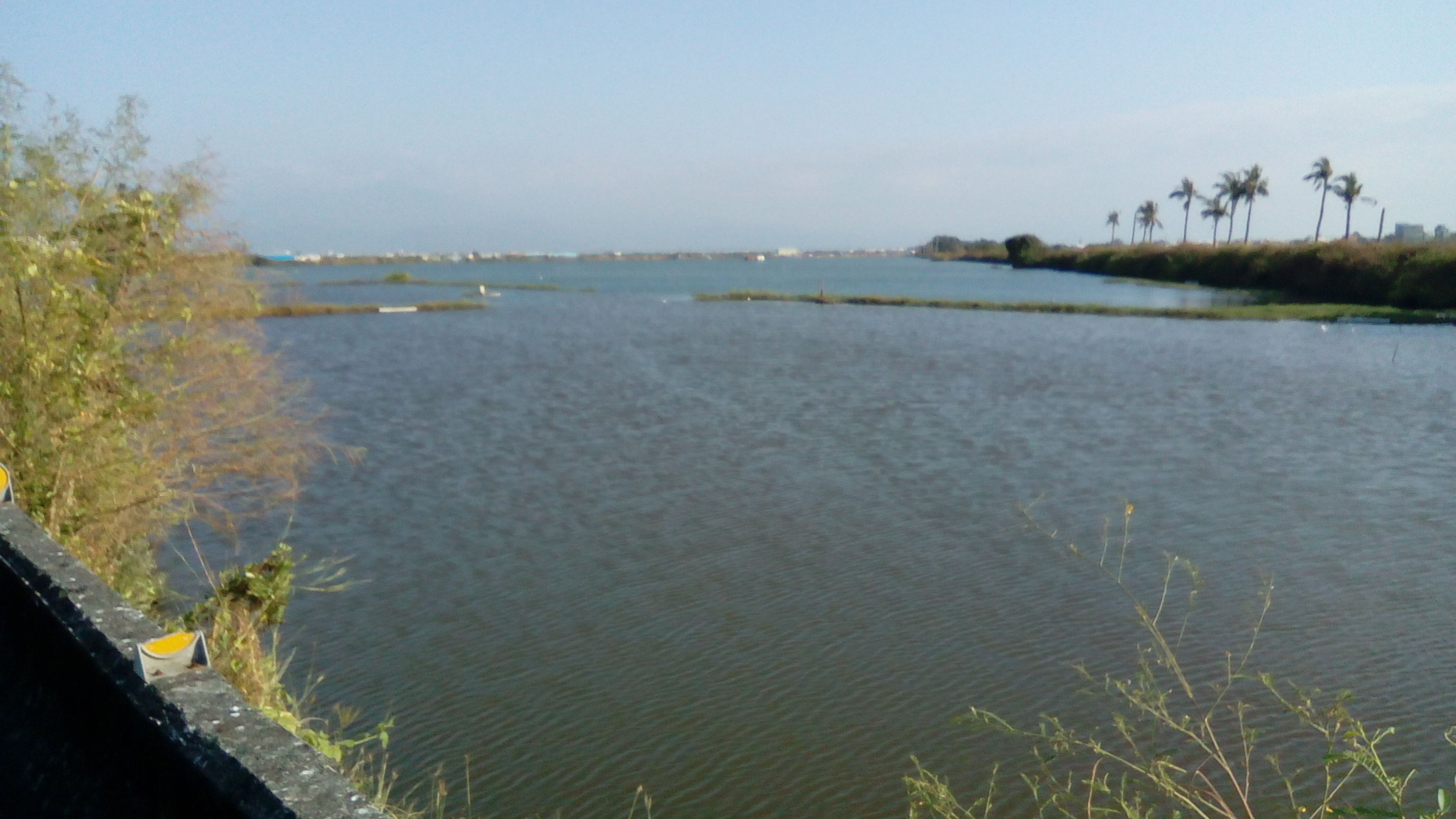 位於鄉內南方的魚塭 因積水不退形成湖泊